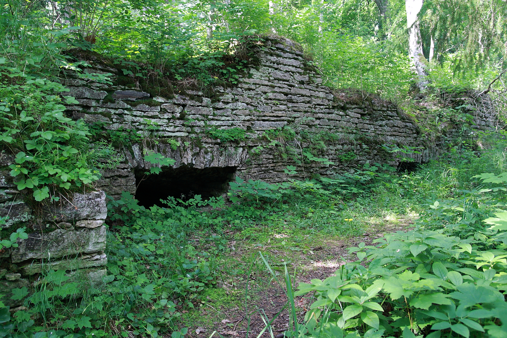 Meremõisa mõisa varemed, 19. saj